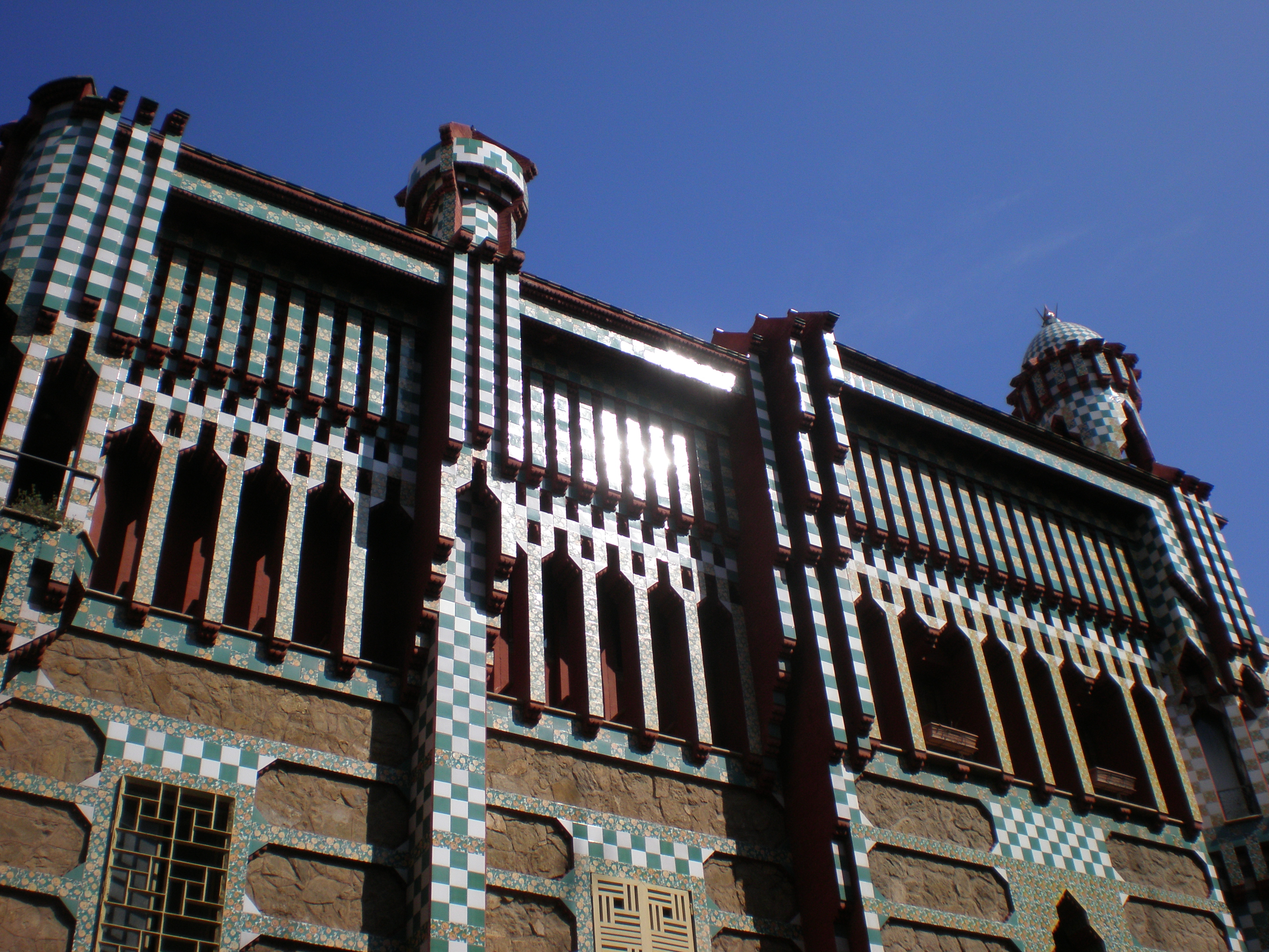 Casa Vicens (Barcelona)